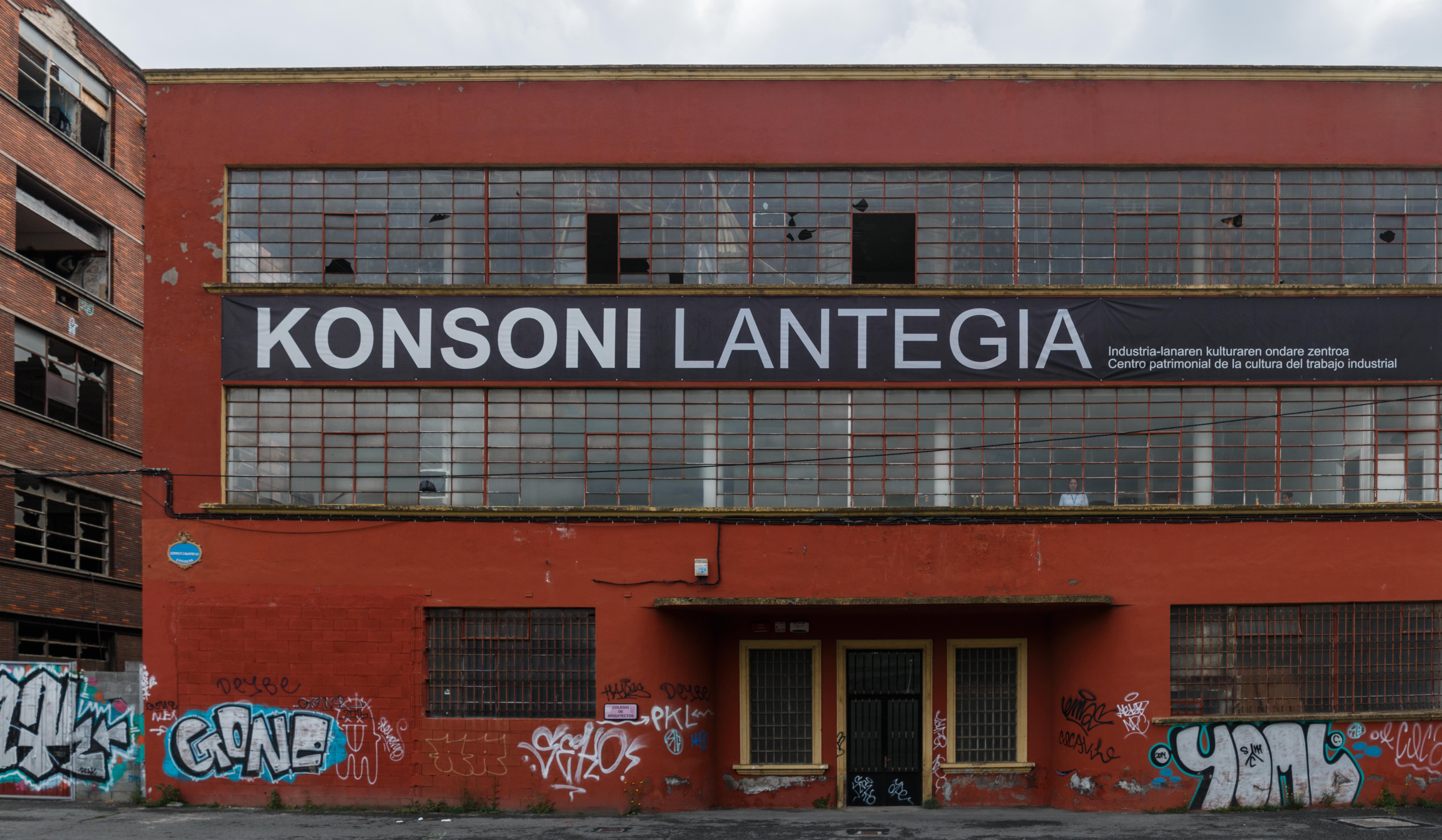 Konsoni Lantegia